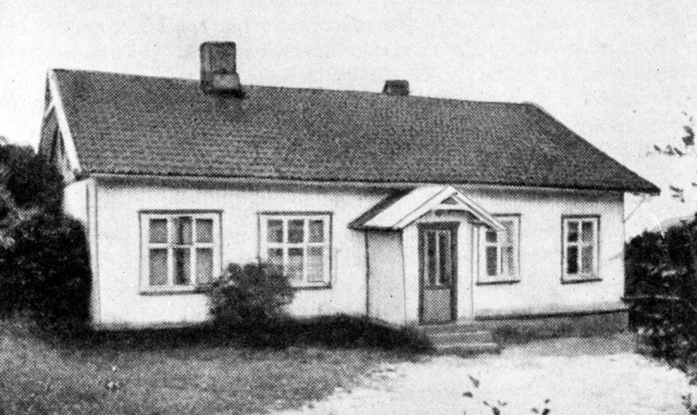 Bernhus gamle skole i Aker